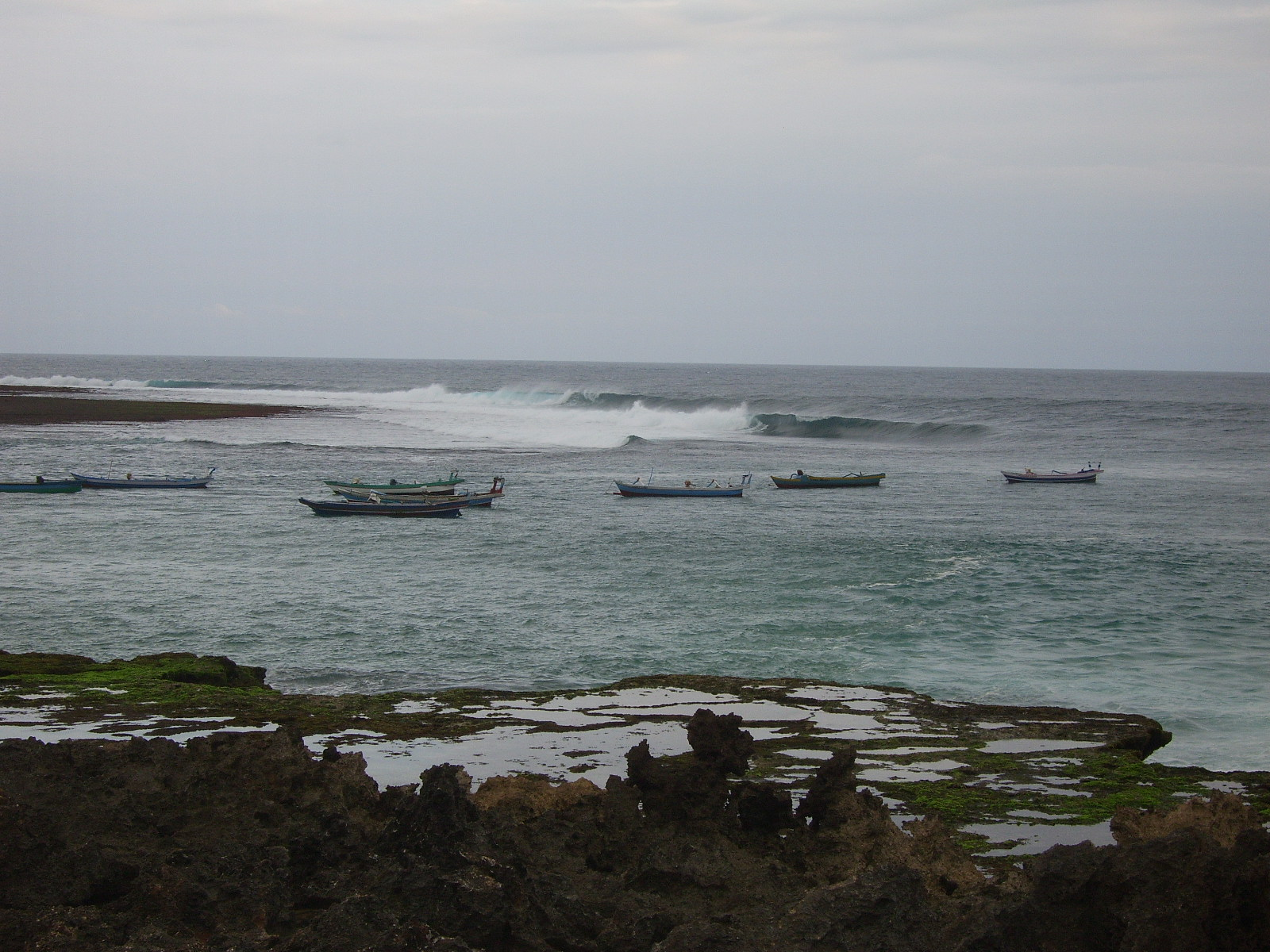 Seaview at Kodi, Sumba